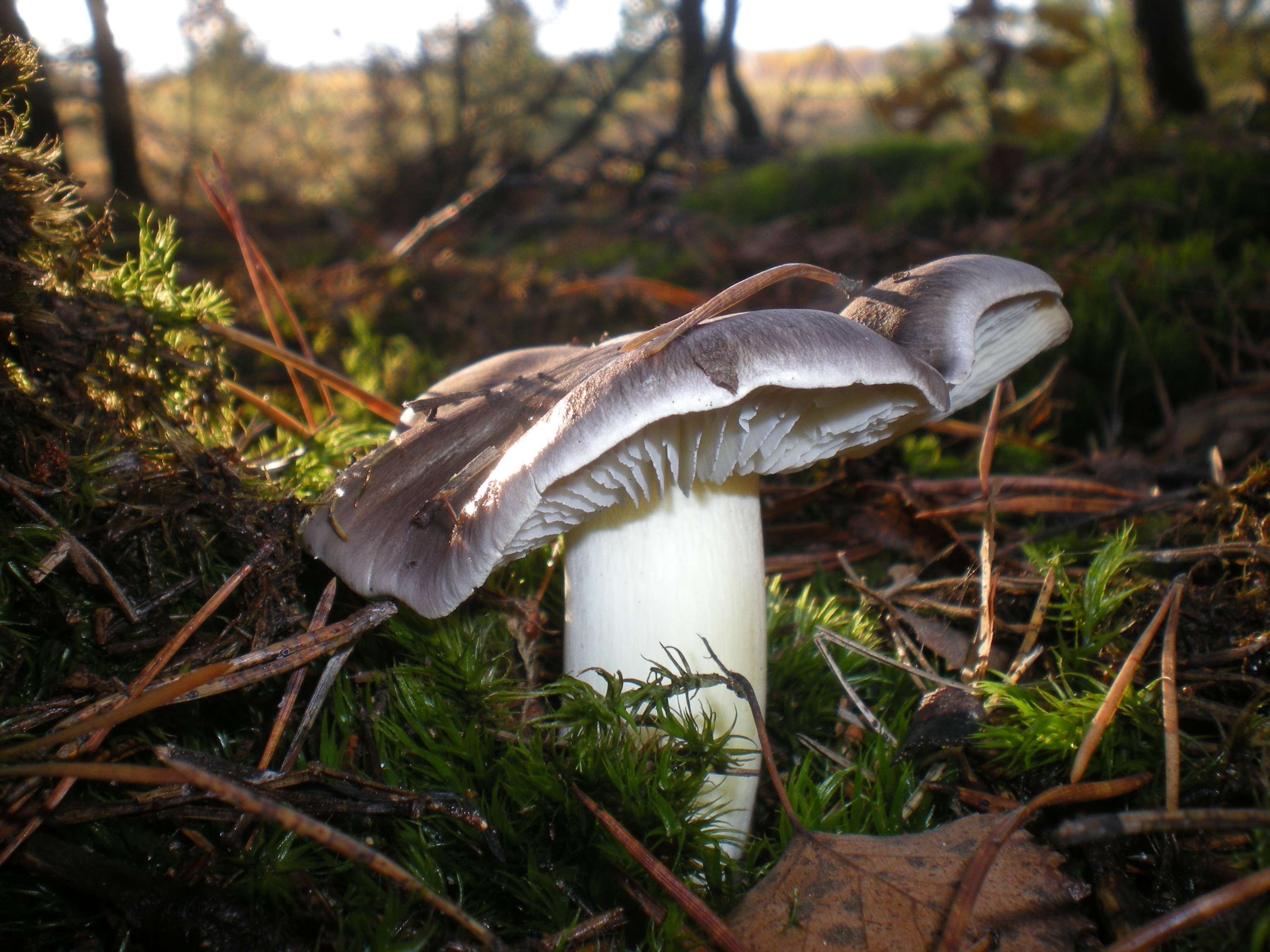 Gąska niekształtna